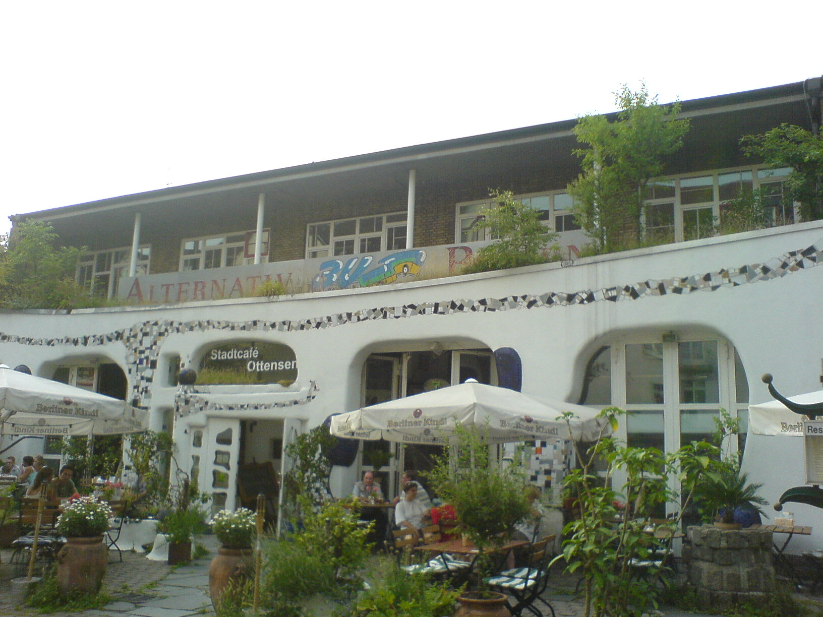 Stadtcafe Ottensen, Hamburg Fotograf/Zeichner: PodracerHH 22:58, 7. Jul 2006 (CEST) (CEST) Datum: 072006 Sonstiges: ...